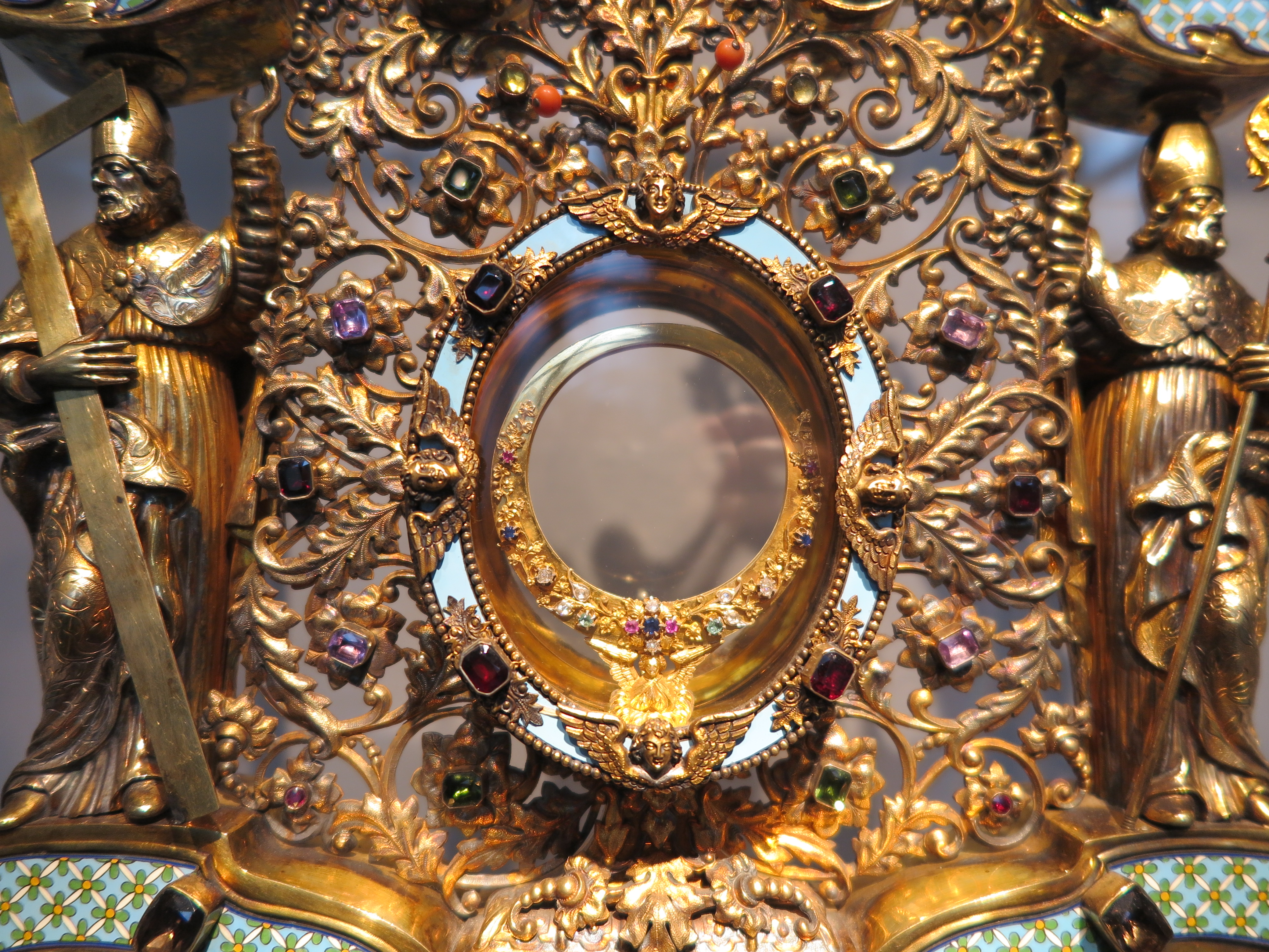 Fensterbereich der Barockmonstranz.